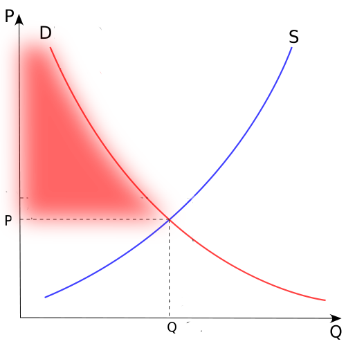 Gràfic on es mostra l'excedent del consumidor.